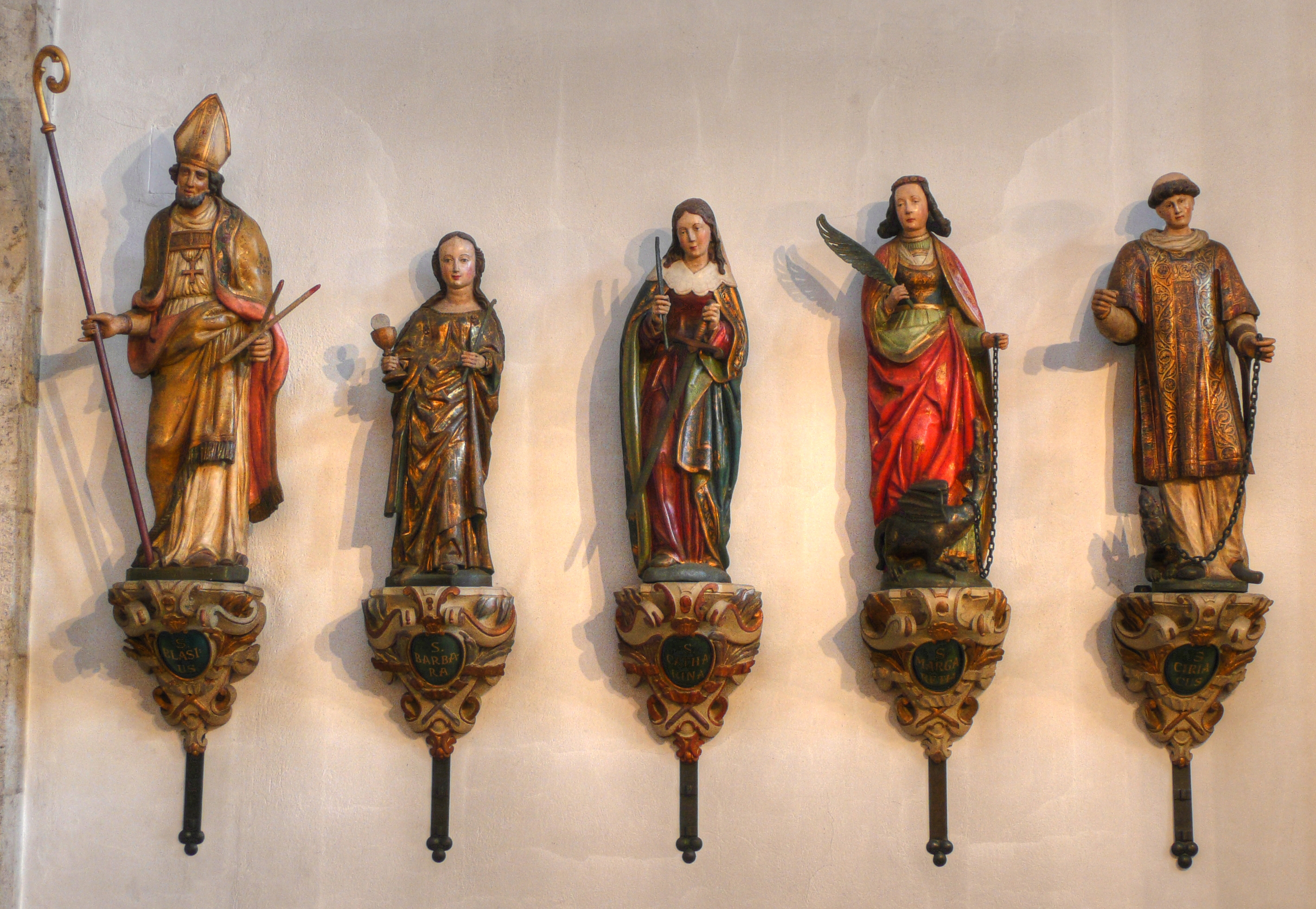 Skulpturen der fünf Nothelfer St. Blasius, St. Barbara, St. Katharina, St. Margaretha und St. Cyriakus in der Kölner Kirche St. Aposteln)